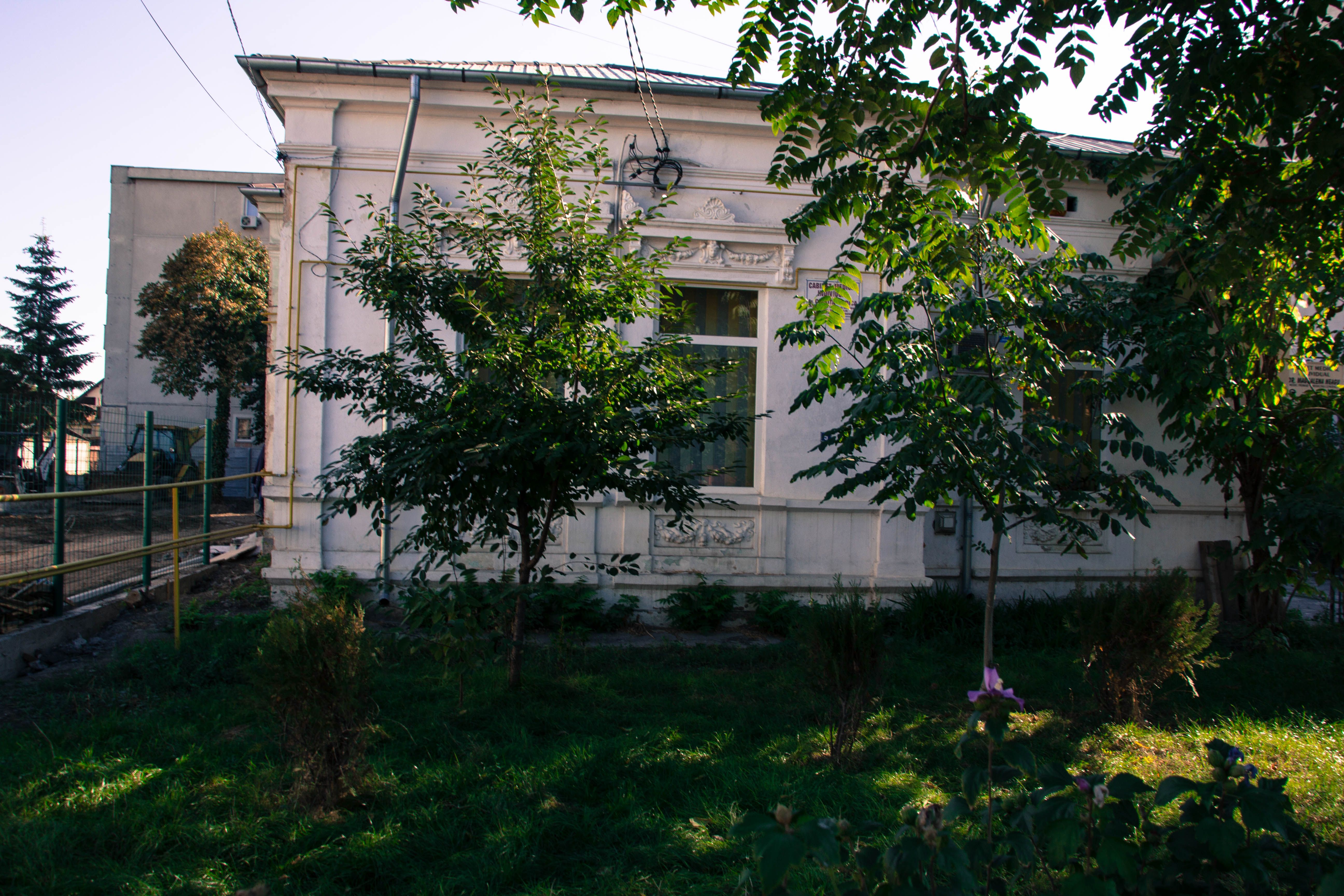 Situl arheologic de la Buzău, punct „Dispensar”